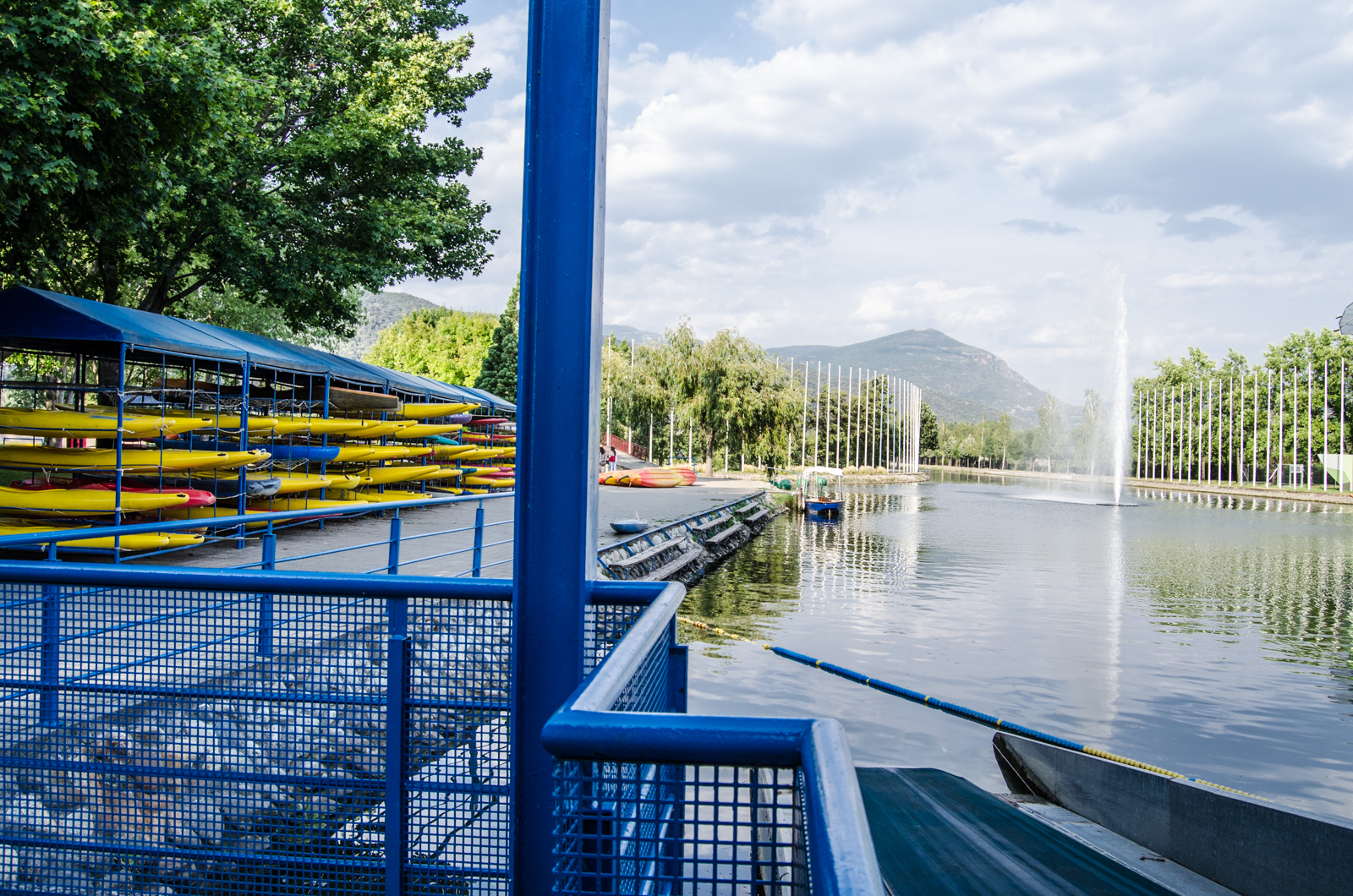 Parque Olímpico del Segre. Seo de Urgel (Lérida - España). Canal de aguas tranquilas.